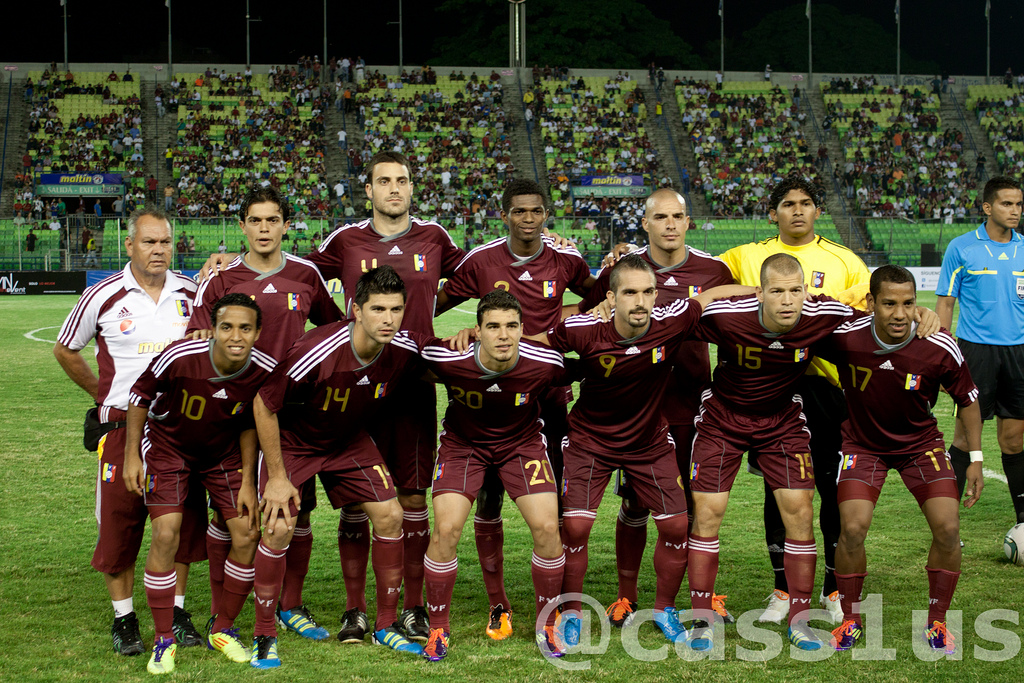 Selección de fútbol de Venezuela previo a un partido amistoso ante Guinea. Arriba de izquierda a derecha: Giacomo Di Giorgi, Andrés Túñez, José Luis Granados, José Manuel Rey, Leo Morales. Abajo de izquierda a derecha: Yohandry Orozco, Franklin Lucena, Alexander González, Giancarlo Maldonado, Alejandro Moreno y Ángel Chourio.